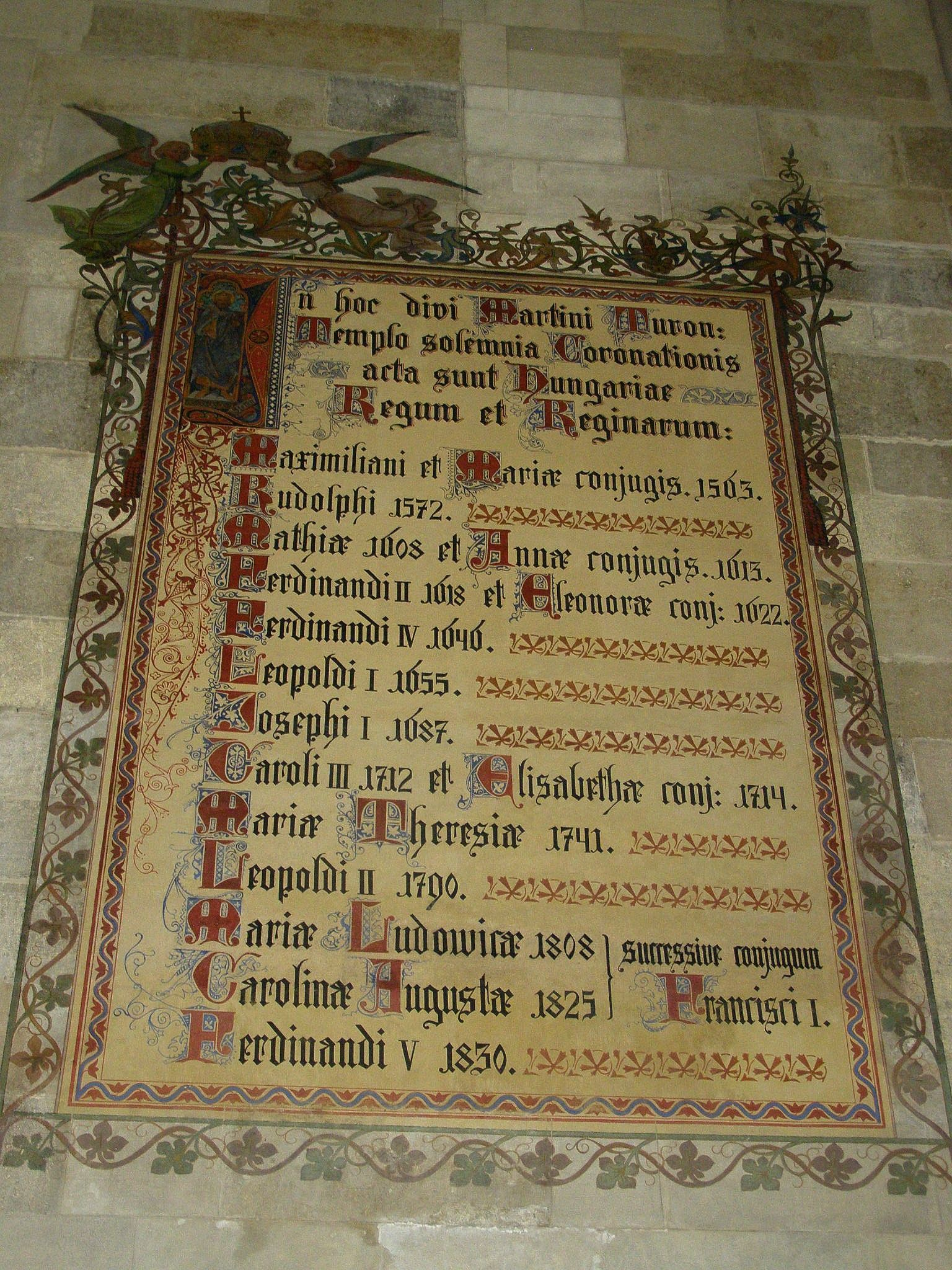 Maľovaný zoznam uhorských panovníkov korunovaných v Katedrále svätého Martina v Bratislave v rokoch 1563 - 1830 v presbytériu katedrály je dielom maliara Carla Jobsta